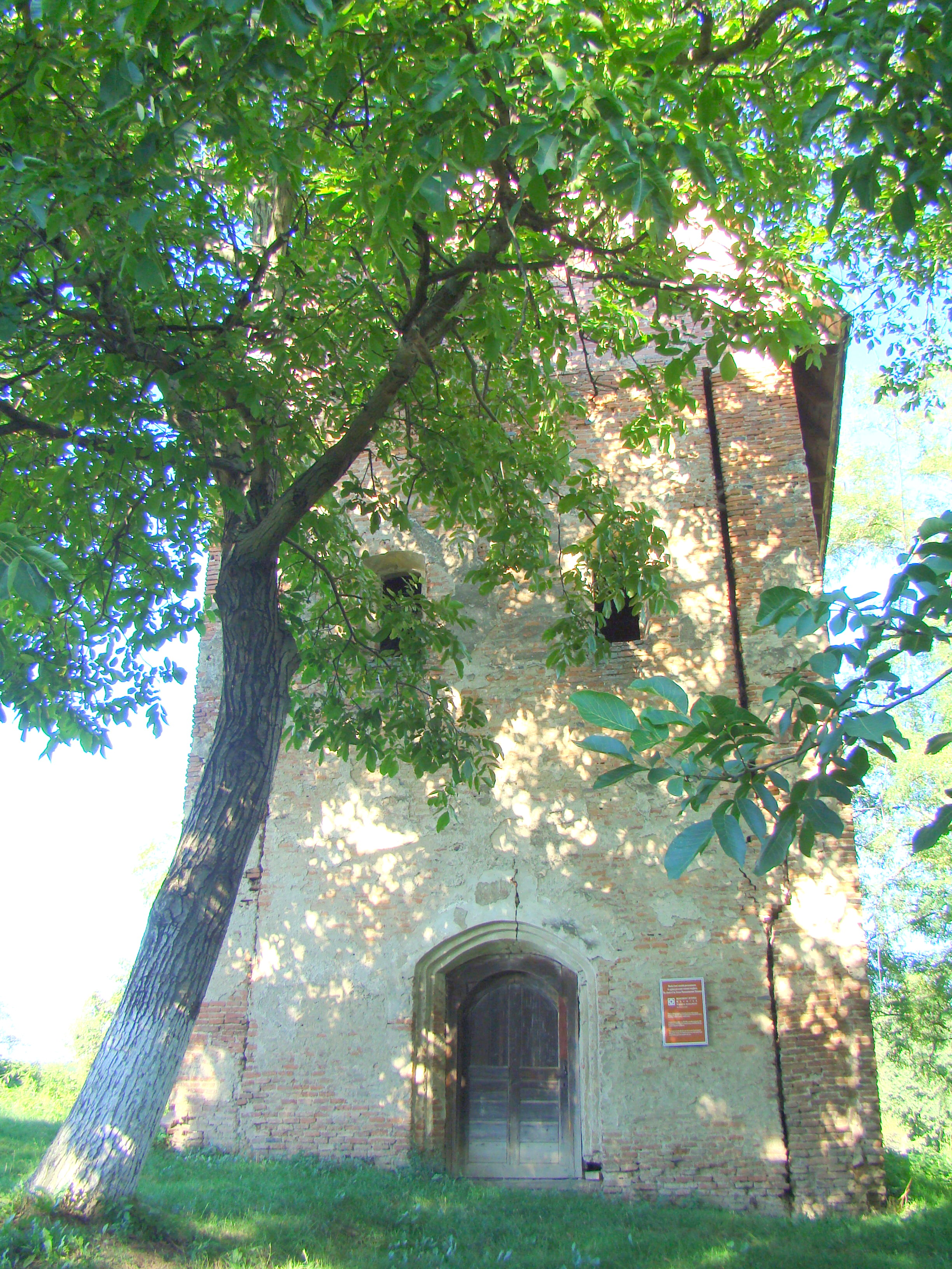 Biserica fostei mănăstiri premonstratense, sat Abram; comuna Abram